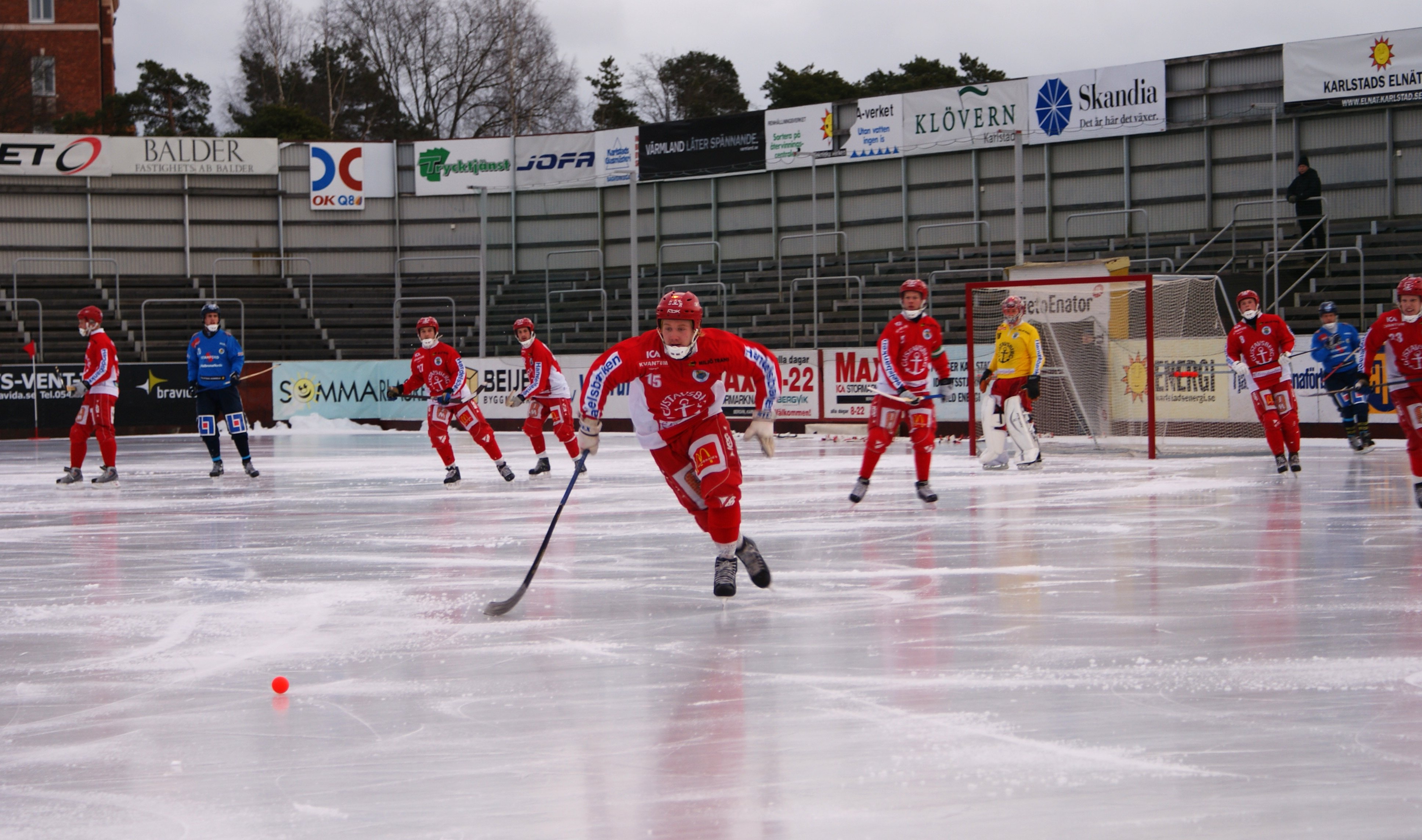 Gustavsberg versus BolticGöta.